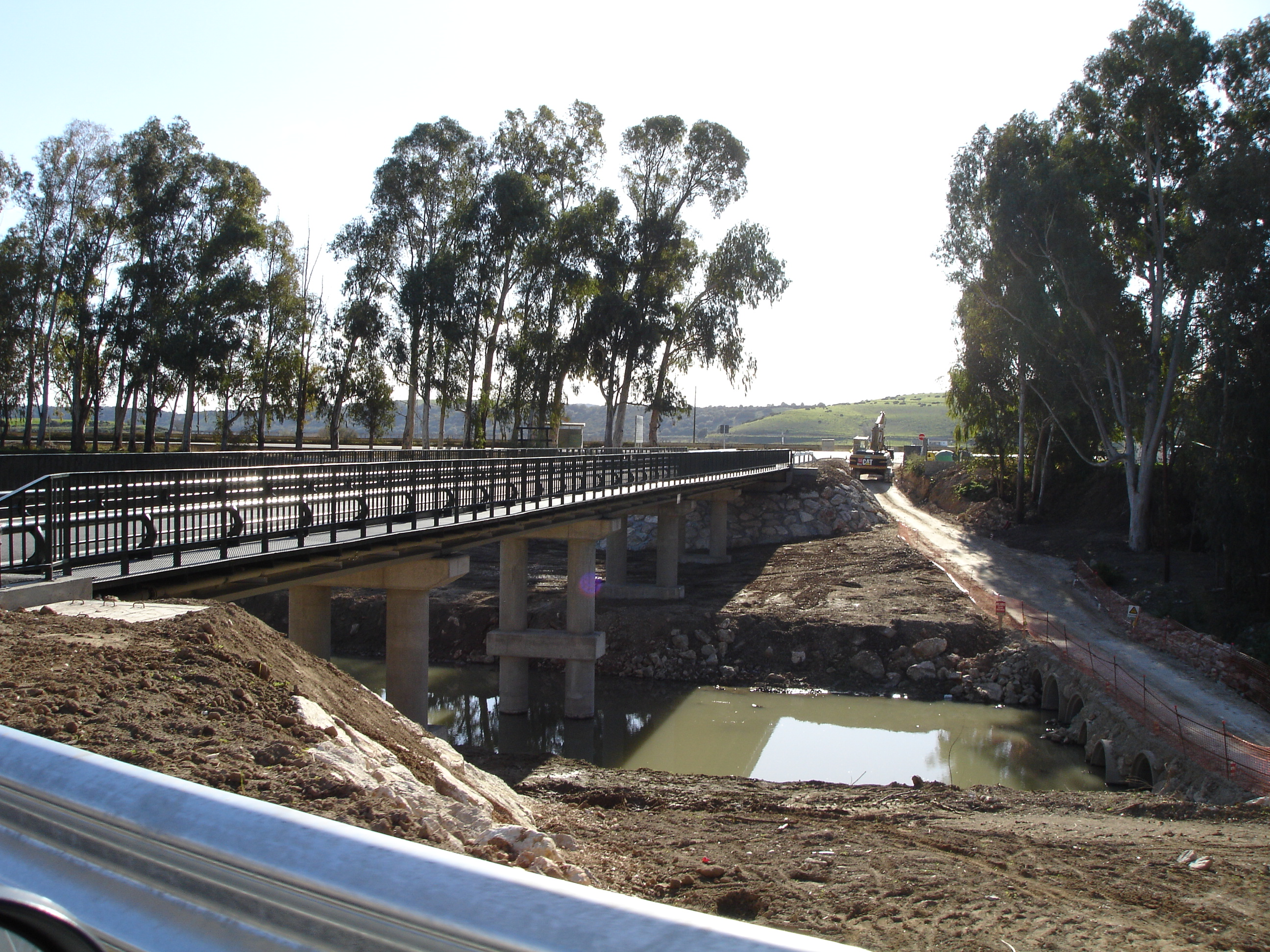 Puente de La Greduela, Jerez (Spain)